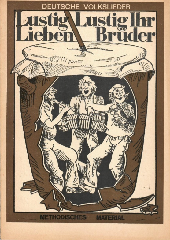 Titelseite der ersten Ausgabe "Deutsche Volkslieder" 1984